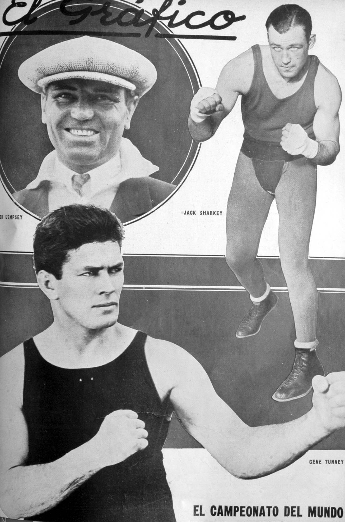 El Grafico del 23 de Julio de 1927. Edicion 420